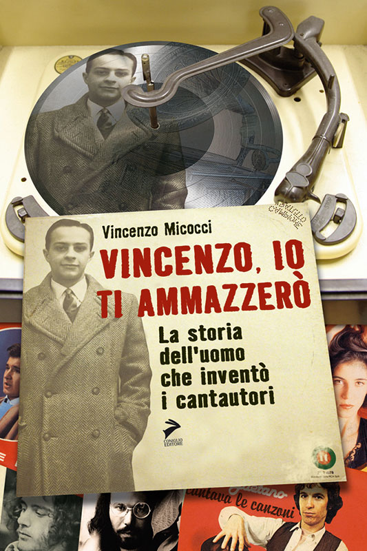 La copertina del 33 giri: Vincenzo, io ti ammazzerò